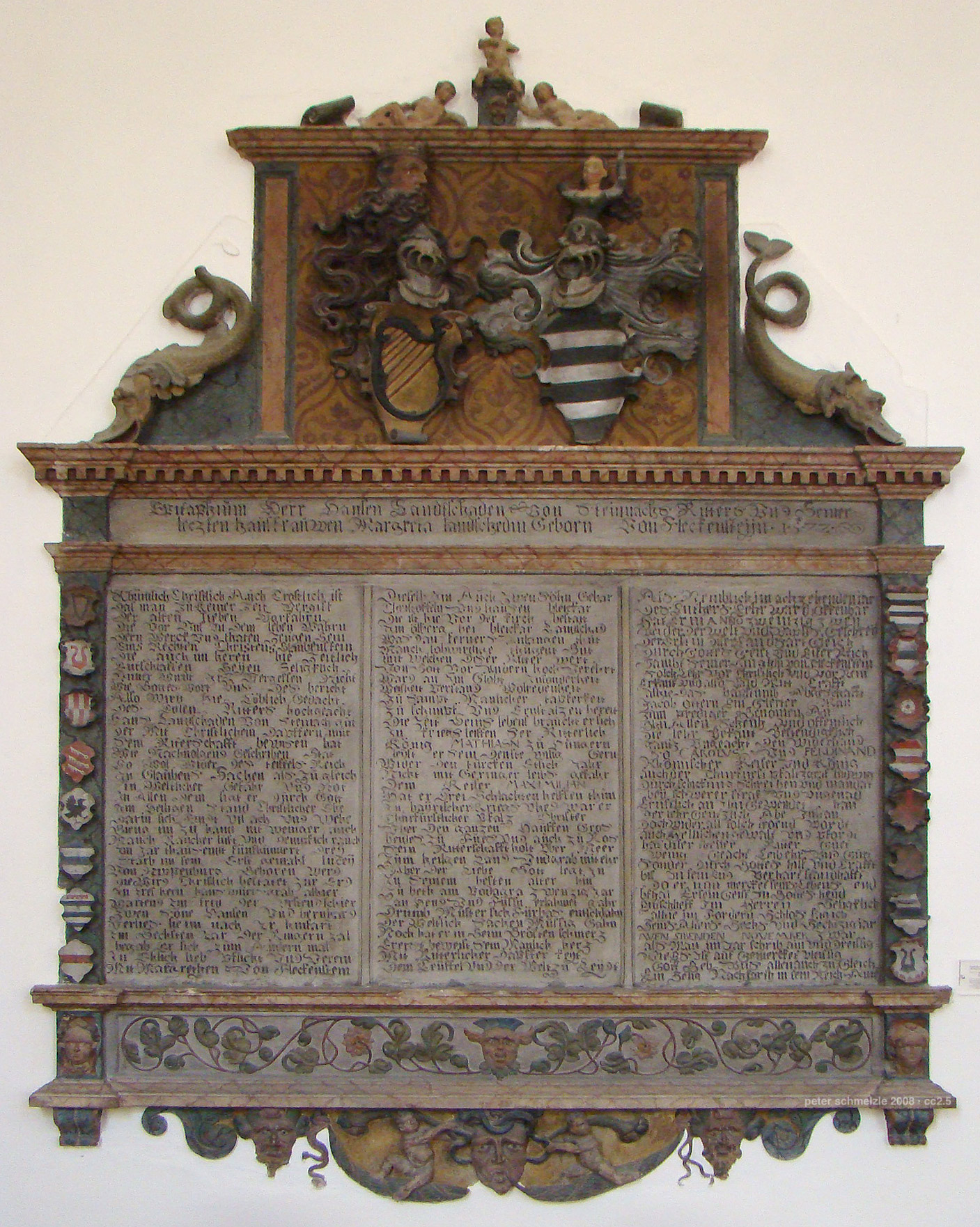 Epitaph des Hans III. Landschad von Steinach († 1531) in der evang. Kirche in Neckarsteinach